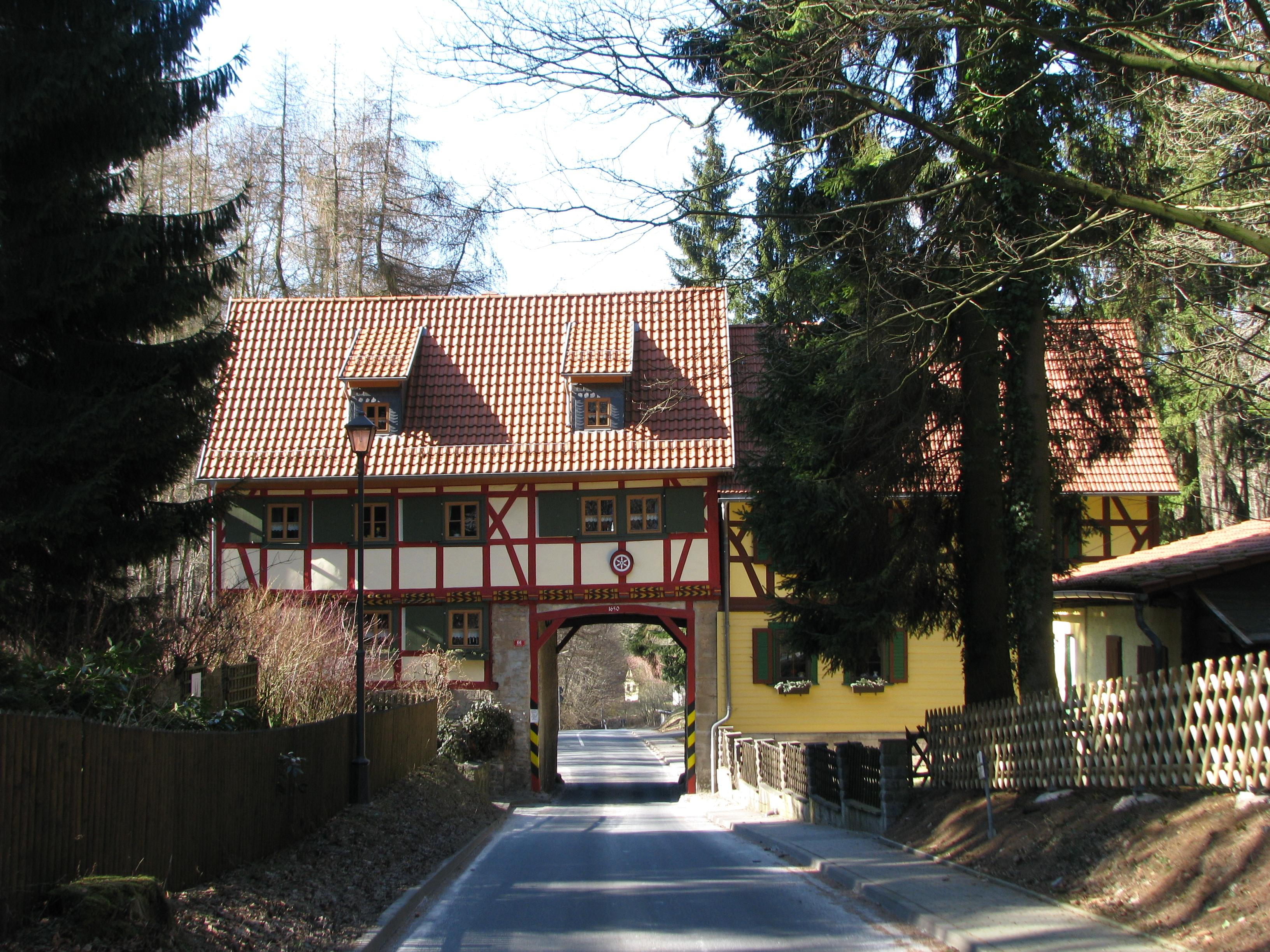 Das sogenannte Grenzhaus östlich von Heyerode am Hainich.